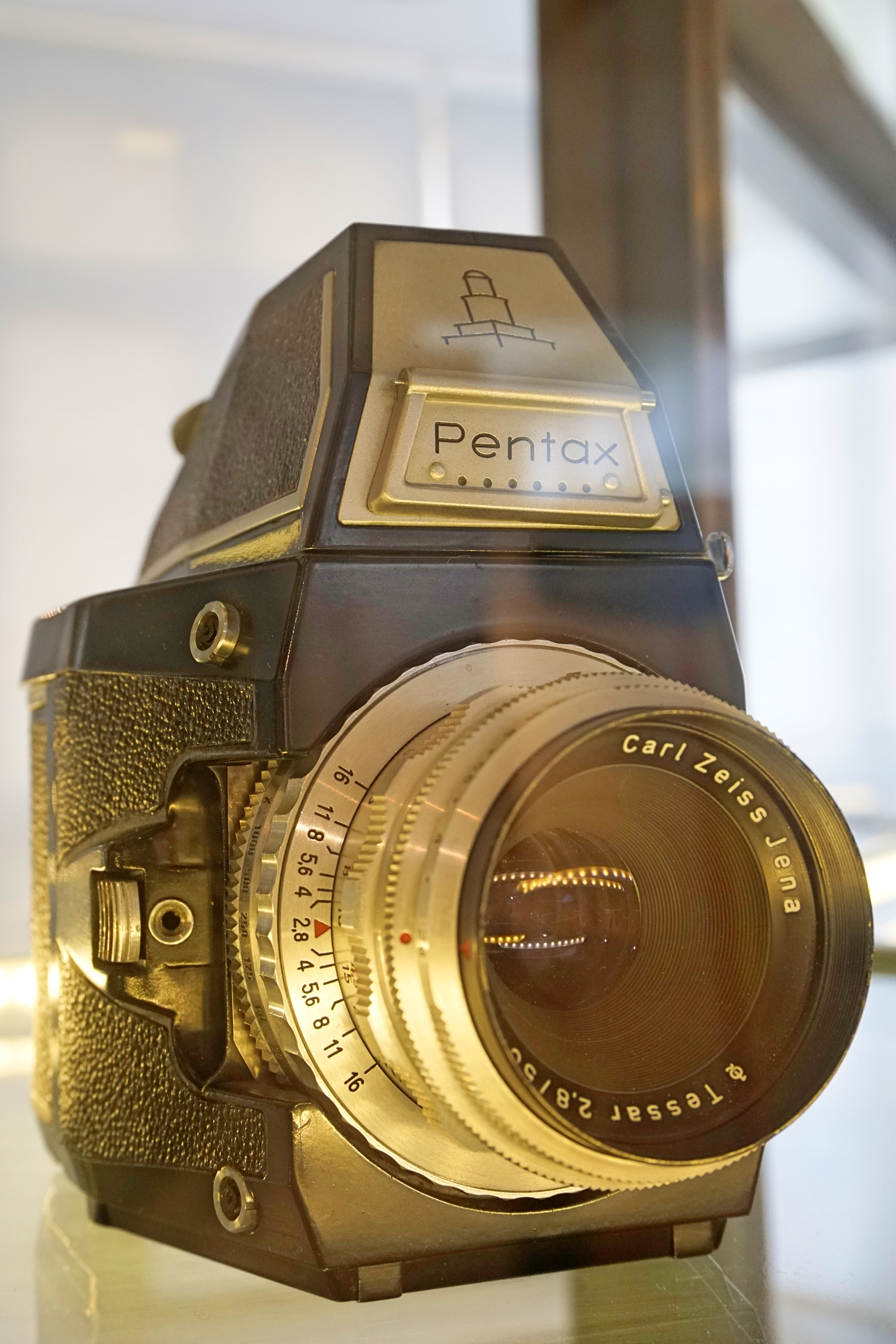 Pentax, 1954 Spiegelreflexkamera, Prototyp Format: 24x36 mm Objektiv: Tessar 2,8/50 VEB Zeiss Ikon, Dresden